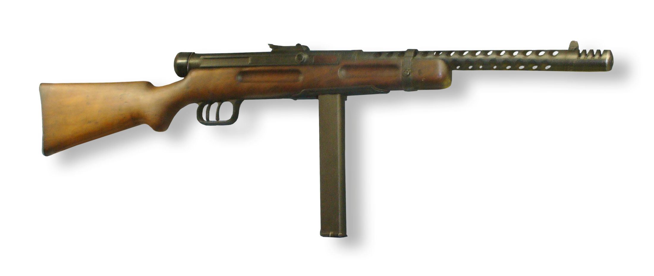 Beretta M1938, Italian submachine gun